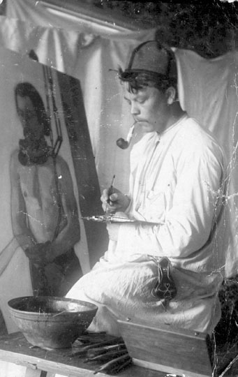 Юхо Риссанен, финский художник